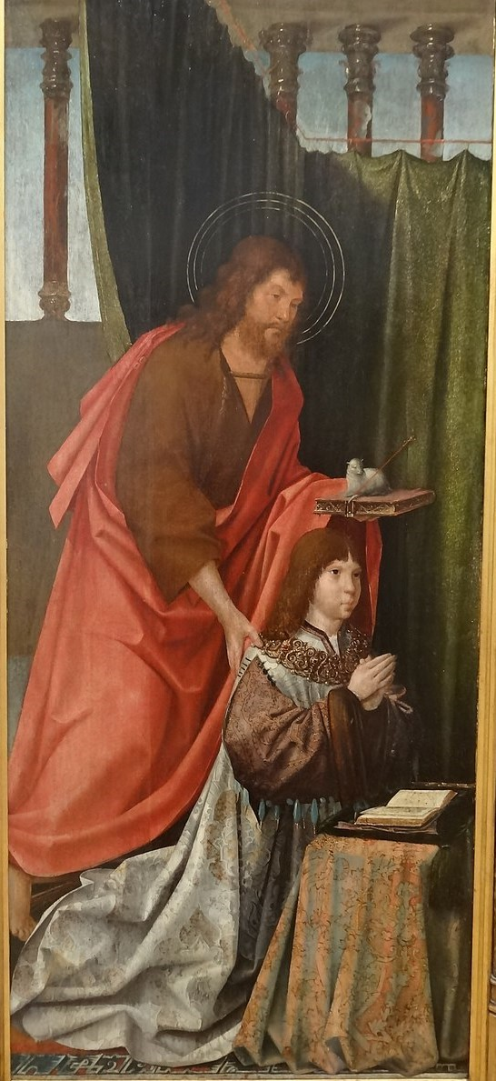 O Príncipe D. João e São João Baptista é o painel lateral esquerdo do Tríptico dos Infantes tendo de altura 157 cm e de largura 67,5 cm. Fez parte de um grande retábulo que o rei D. Manuel mandou fazer para a capela mor da igreja do mosteiro dominicano em Almeirim